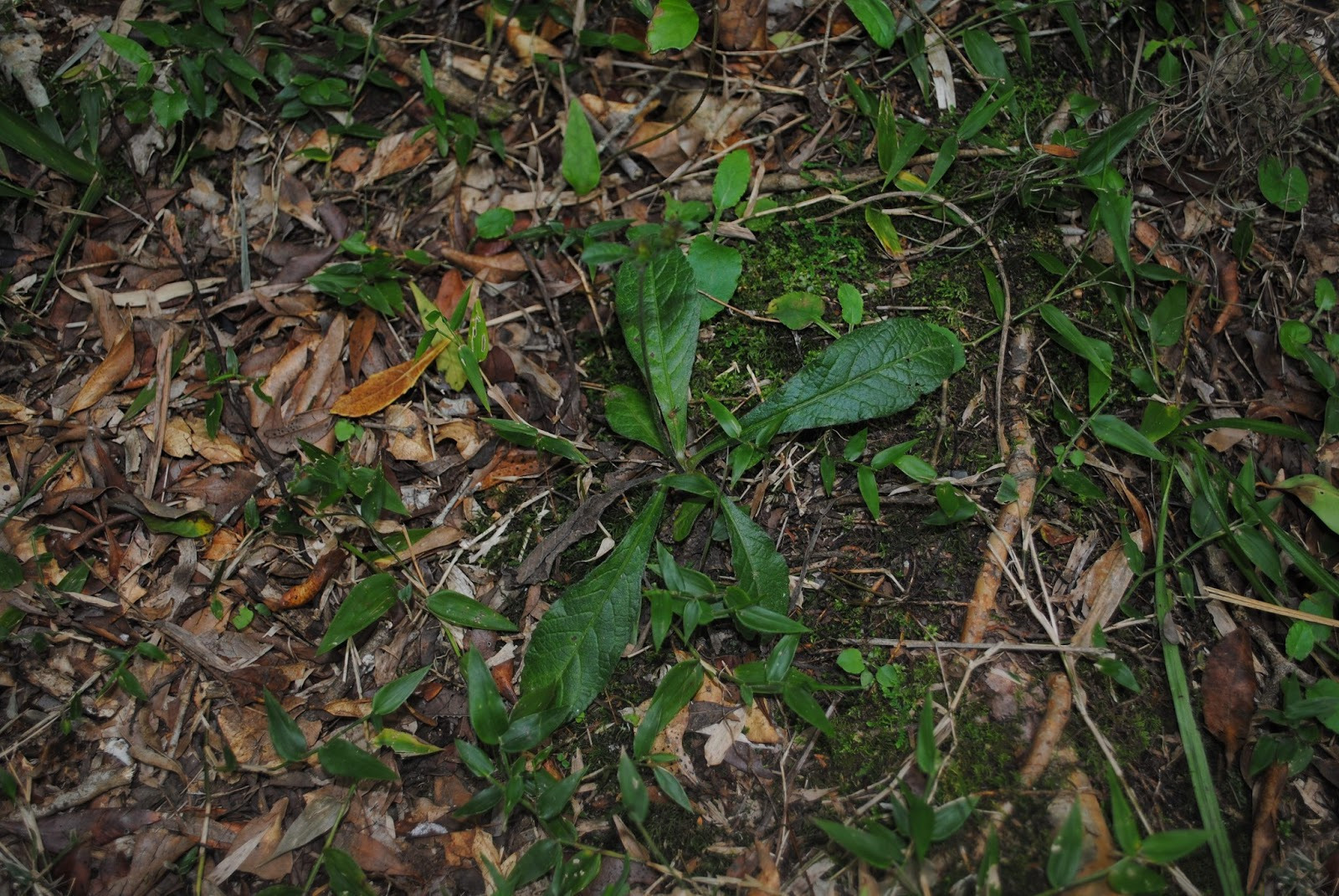 Elephantopus mollis. Asteraceae. Fotos tomadas bajo bosque de quebrada entre rocas al margen del Arroyo Yerbal Chico en la Quebrada de los Cuervos, departamento de Treinta y Tres, Uruguay.